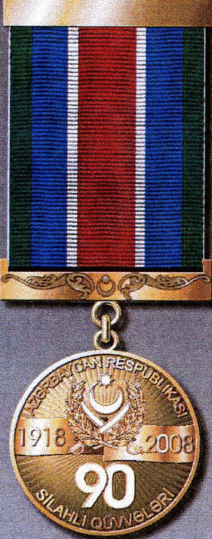 Azərbaycan Respublikası Silahlı Qüvvələrinin 90 illiyi (1918-2008) yubiley medalı